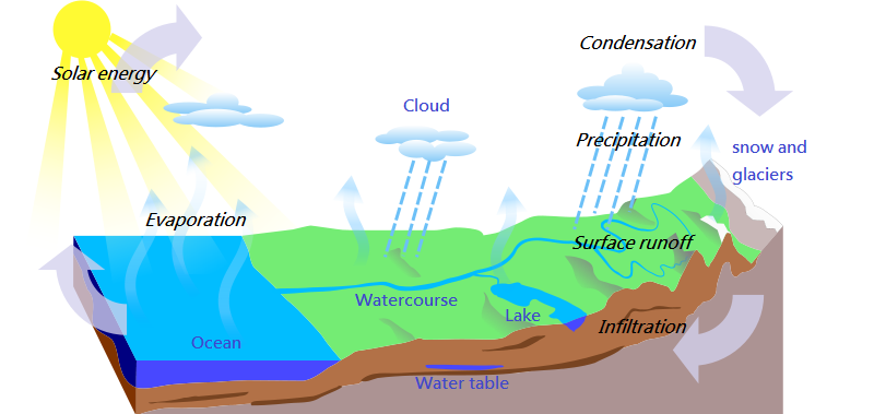 Water Cycle, SVG from Wasserkreislauf.png * Left blank for translations *Wasserkreislauf *Datum: Mai 2005 *Lizenz: GNU-FDL Source: german wikipedia, original upload 3. Mai 2005 by Joooo Bild:Wasserkreislauf.png